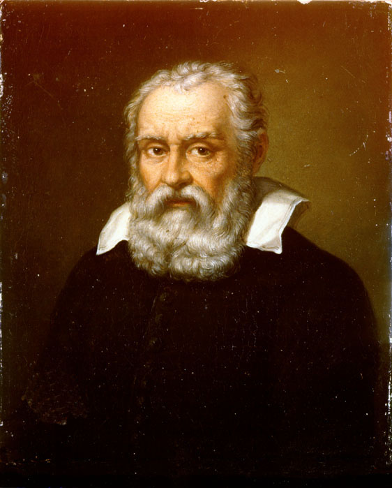 Domenico Cresti da Passignano or Passignani (1558-1638), Portrait of Galileo Galilei, paint on silver paper.